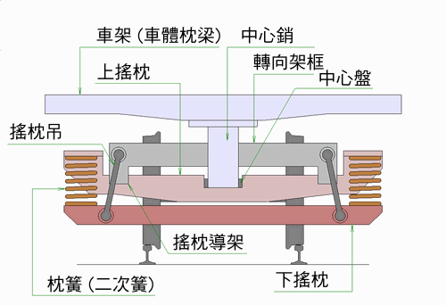 搖枕式轉向架斷面